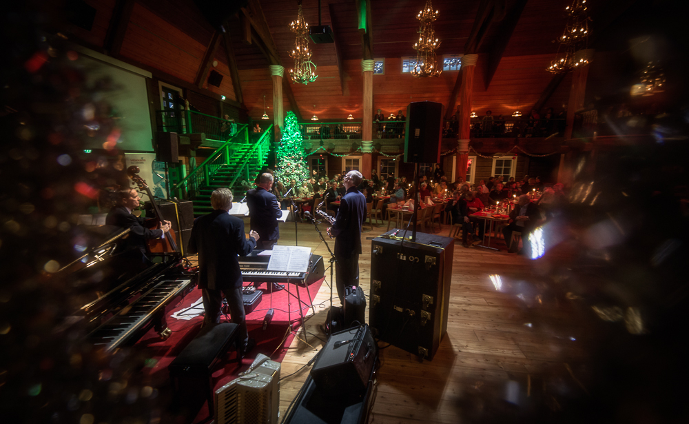 Kaamosjazz tunnelmaa illalliskonsertissa.